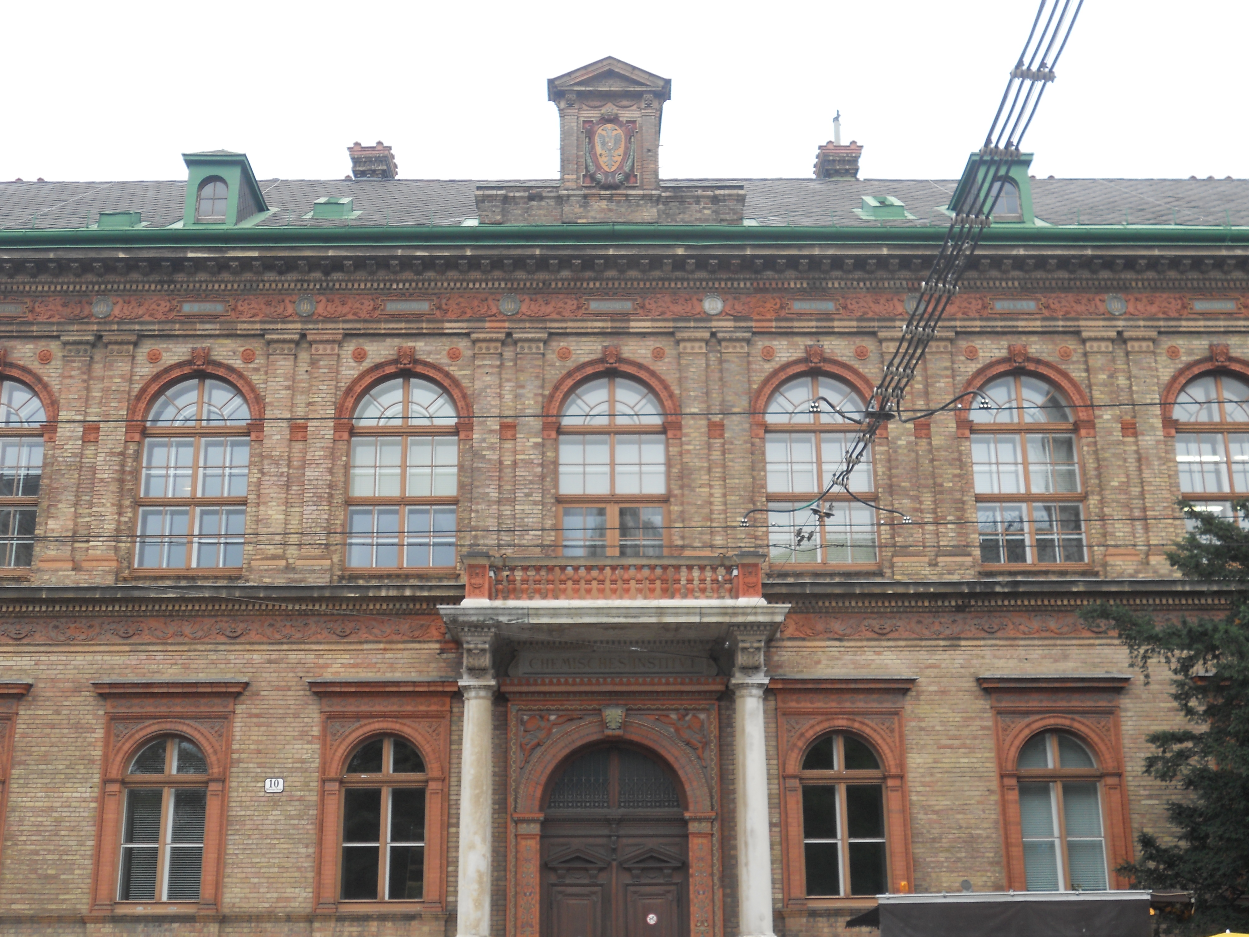 Das Institutsgebäude der Universität Wien in der Währinger Straße 10